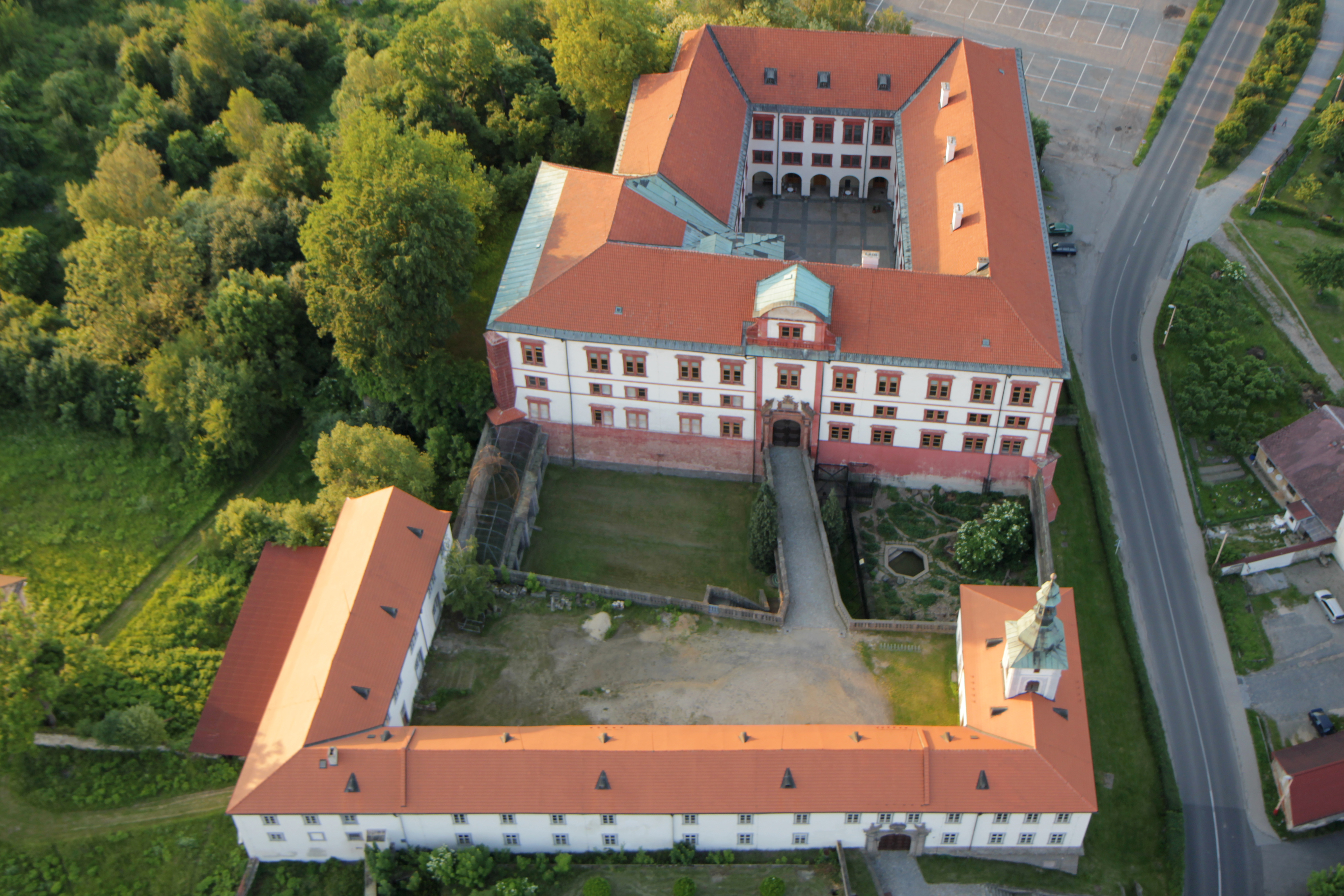 Zámek Zákupy s přilehlým areálem, Borská 1, Zákupy